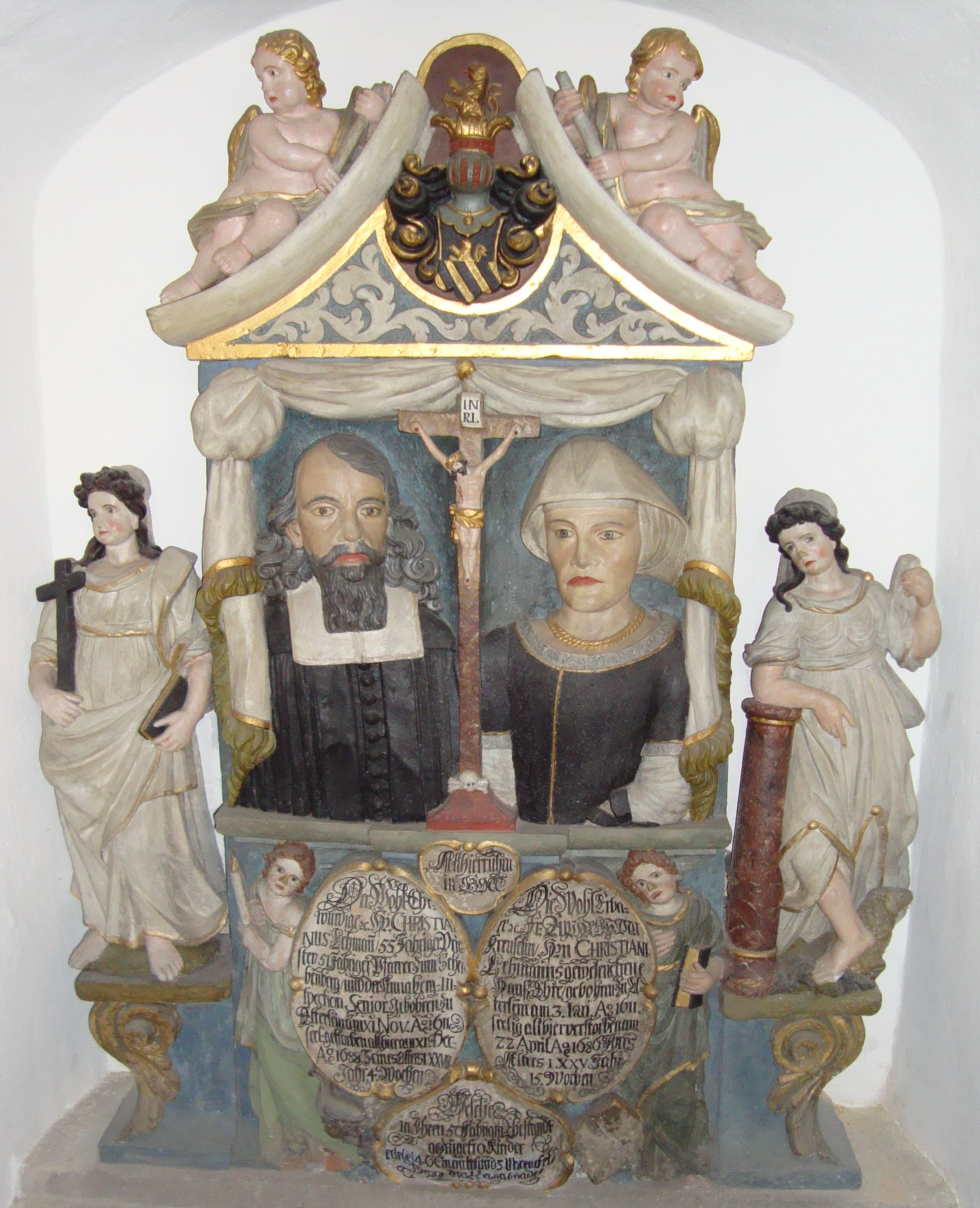 Epitaph für den evangelischen Pfarrer und Chronisten des Erzgebirges Christian Lehmann (1611–1688) und seine Frau Euphrosina geb. Kreusel (1611–1688) in der Johanniskirche in Scheibenberg